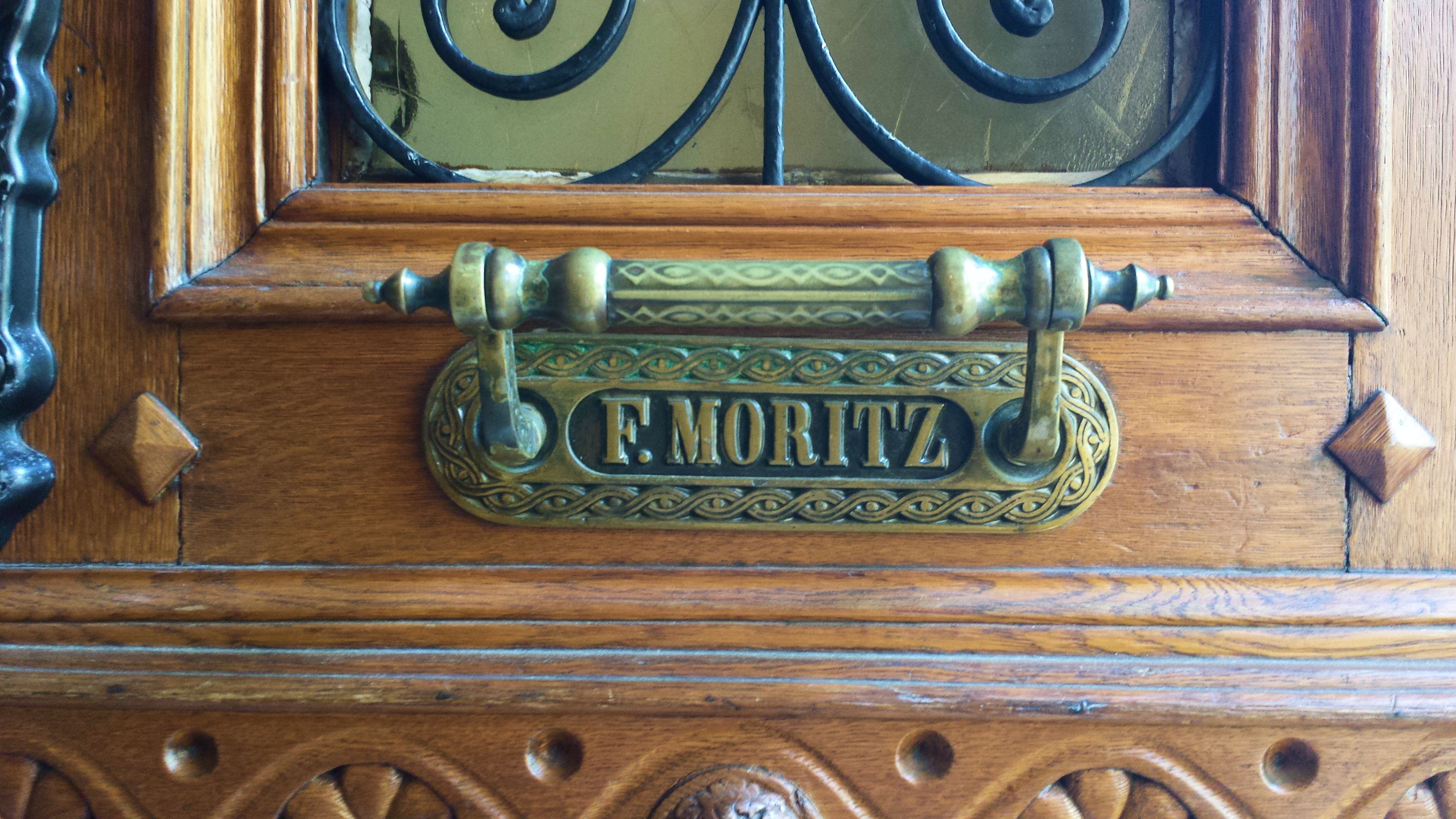 Türschild mit Namenszug F. Moritz Cochem Ravenéstraße 15